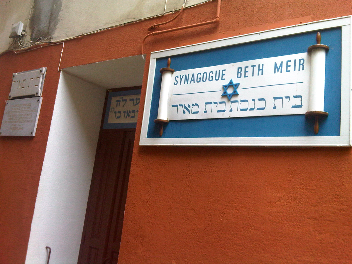 Vèneto: Ingresso dea sinagoga de Bastia